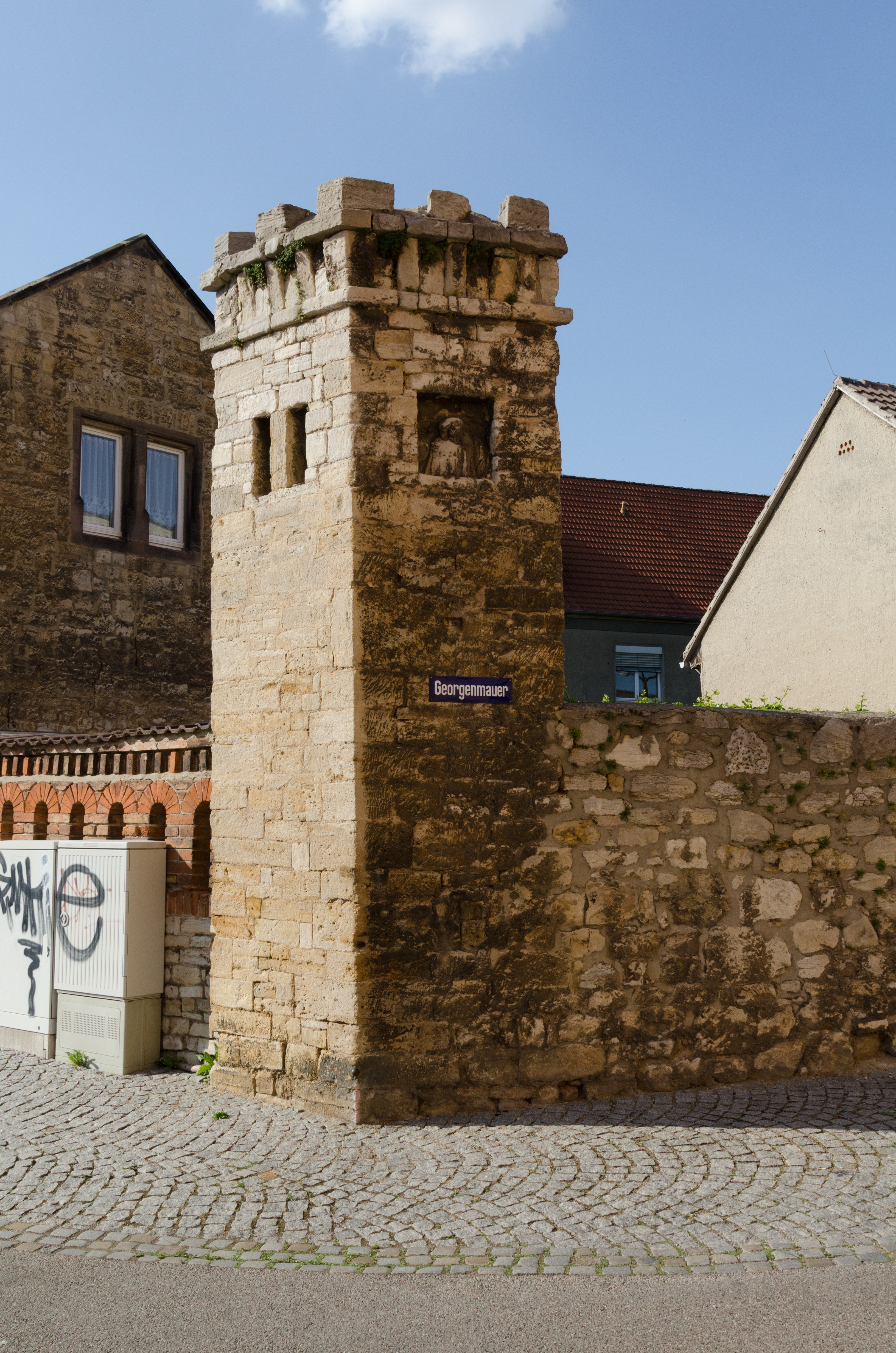 Naumburg, Georgenstraße 5